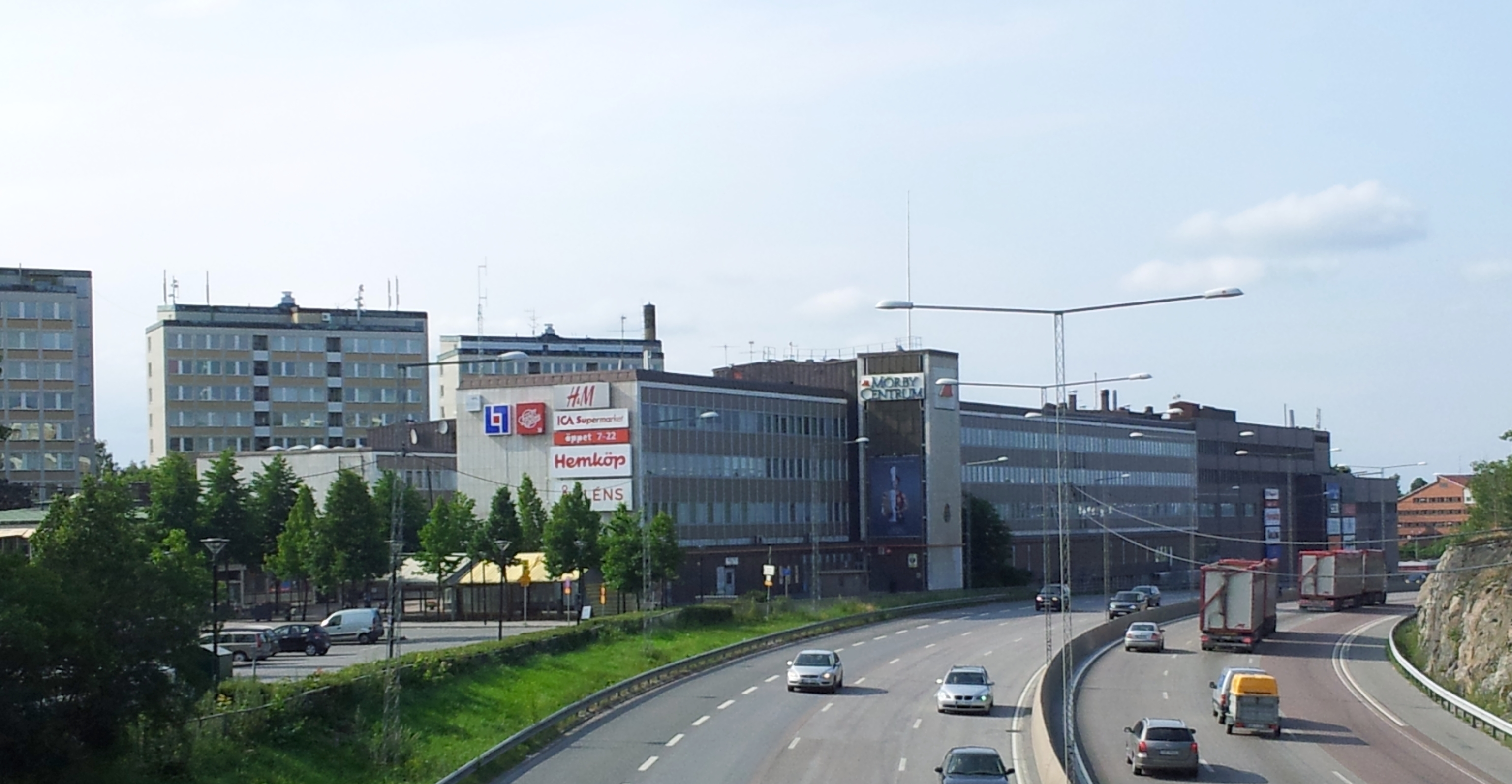 Mörby Centrum, vy från söder, juli 2012